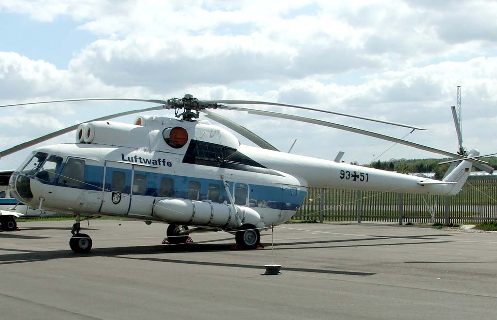 Mi-8 Hip (9351) - Luftwaffe Museum - Gatow-Berlin - 2007